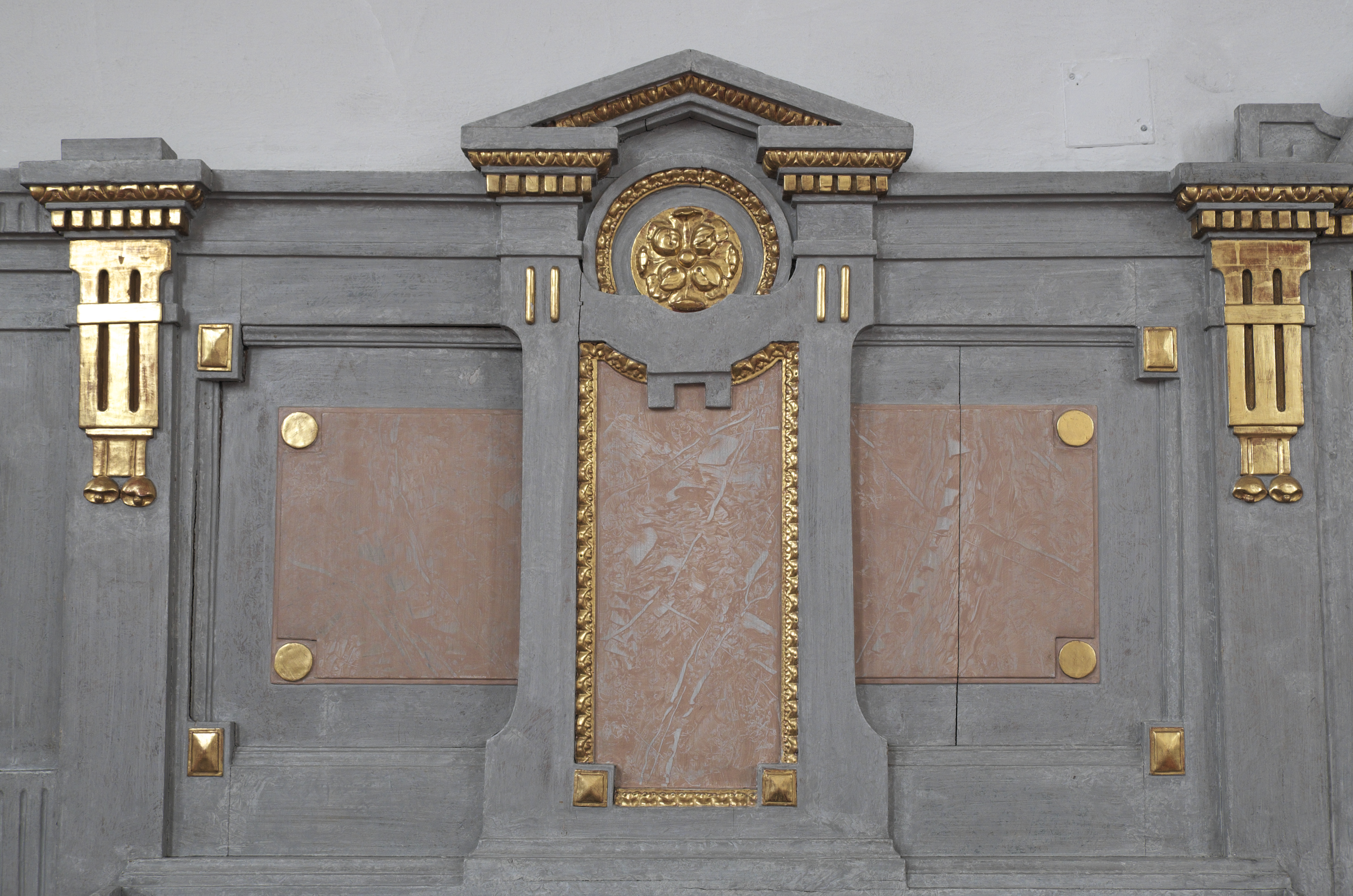 Katholische Pfarrkirche St. Johann Baptist in Asch (Fuchstal) im Landkreis Landsberg am Lech (Bayern/Deutschland), Holzvertäfelung im Chor